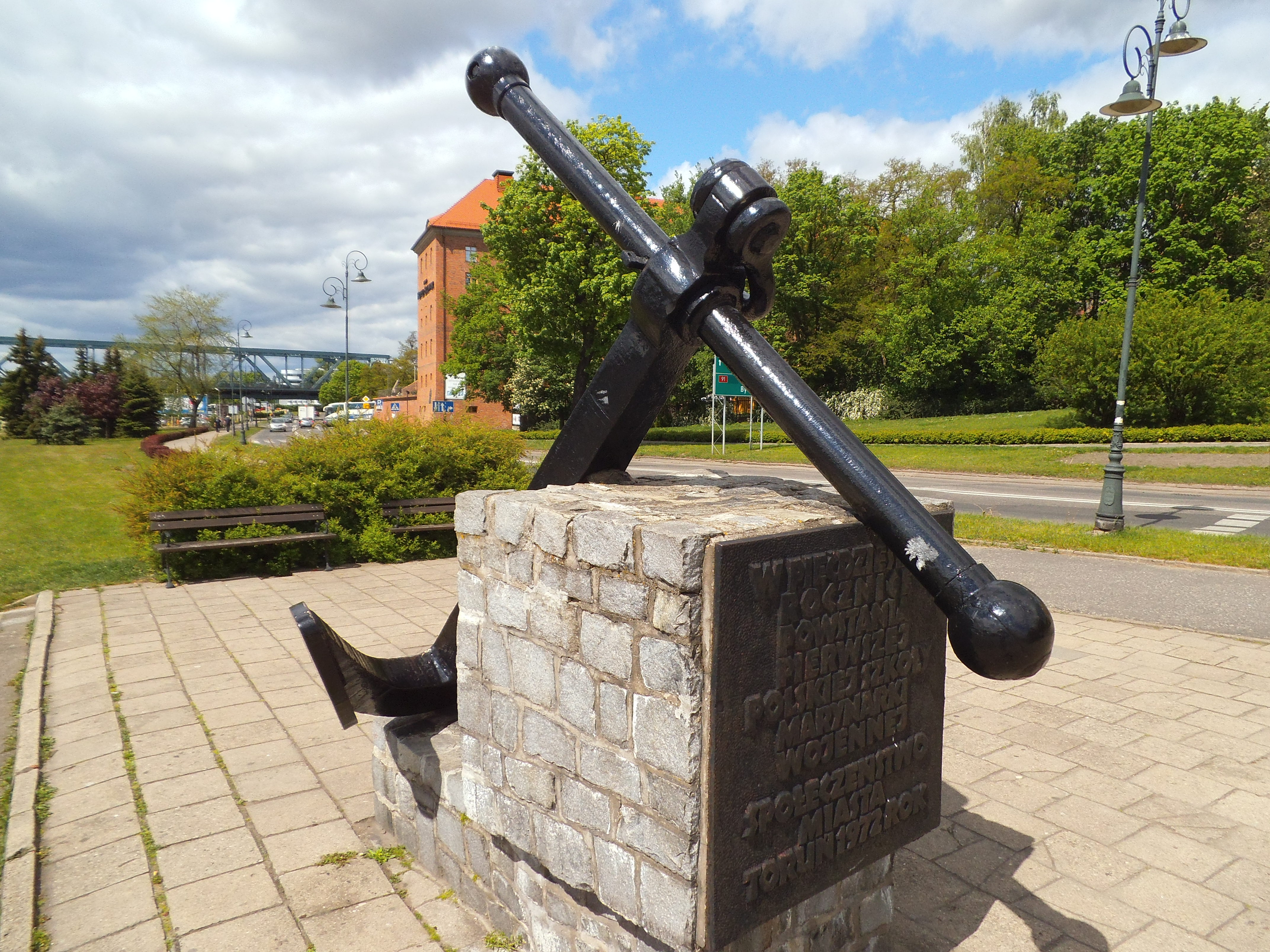 Bulwar w Toruniu